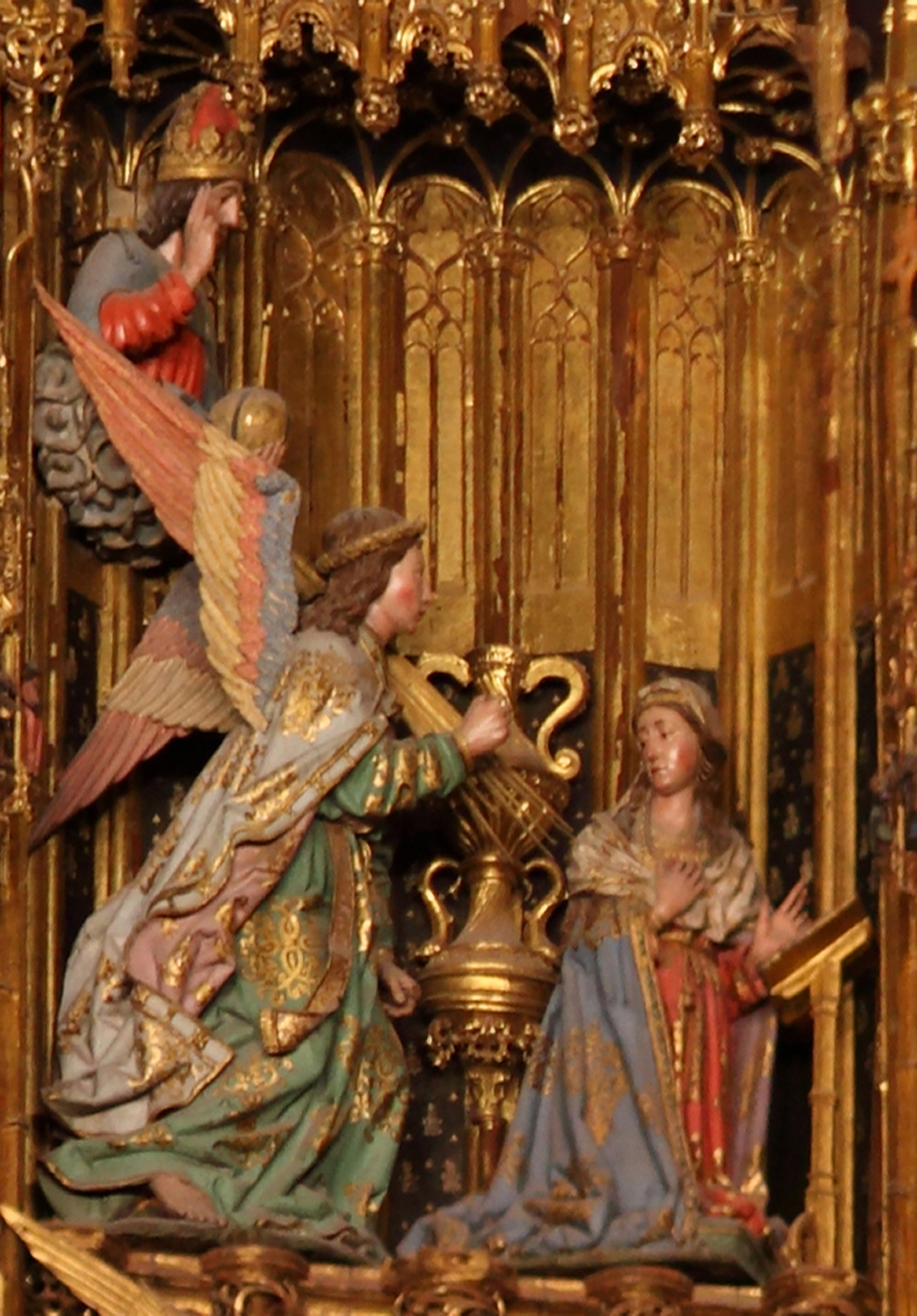 Detalle de La Anunciación del retablo mayor de la Catedral de Toledo (España)